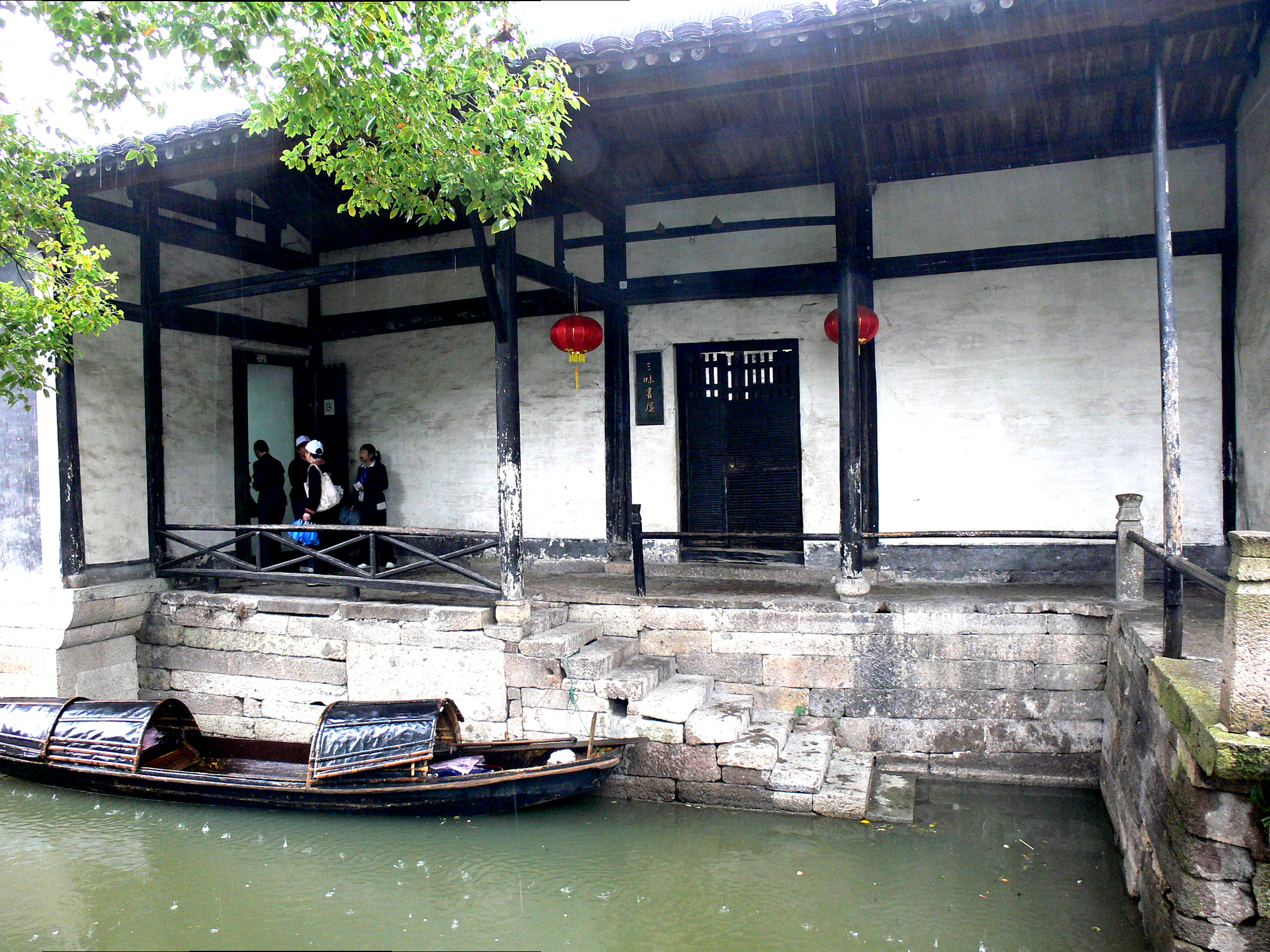 绍兴鲁迅故居三味书屋